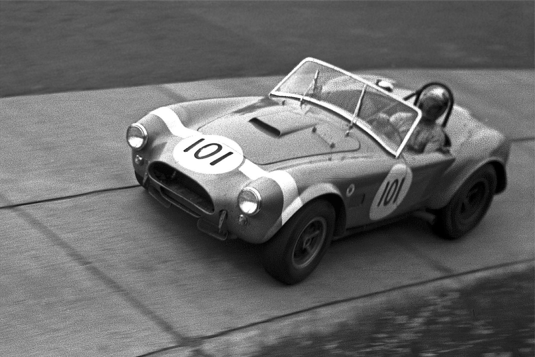 Bob Bondurant im AC Cobra beim Training zum 1000-km-Rennen auf dem Nürburgring 1964, Streckenabschnitt Schwalbenschwanz